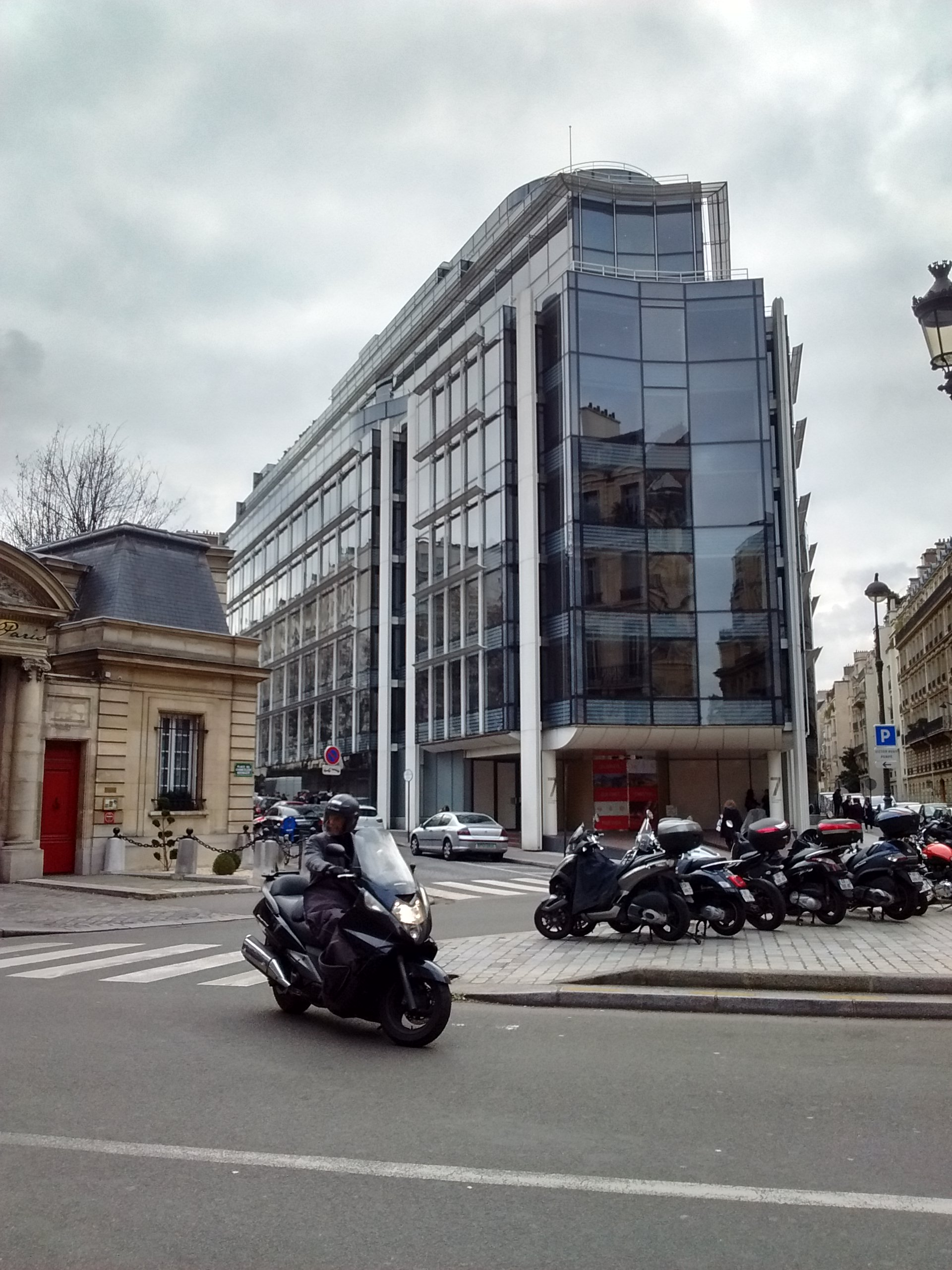 Siège d'Unibail-Rodamco-Westfield situé au 7, place du chancelier Adenauer 75116 Paris